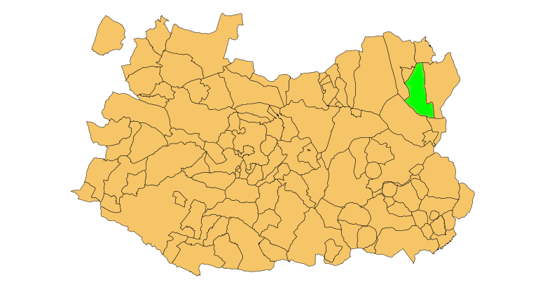 Tomelloso municipality map